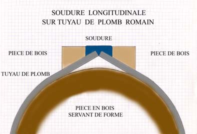 Sketch of longitudinal welding of roman lead pipe.